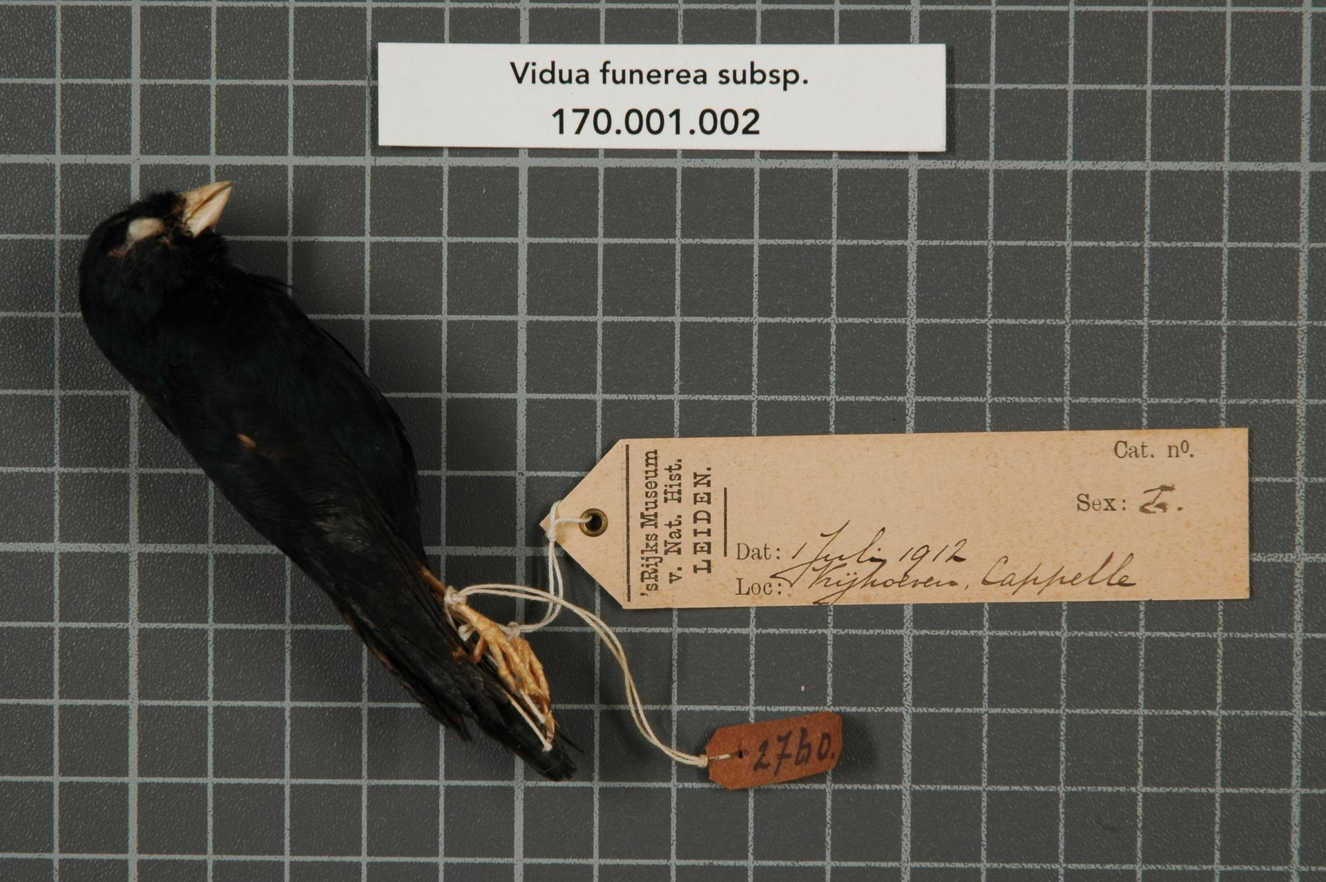 Presua funerea subsp.